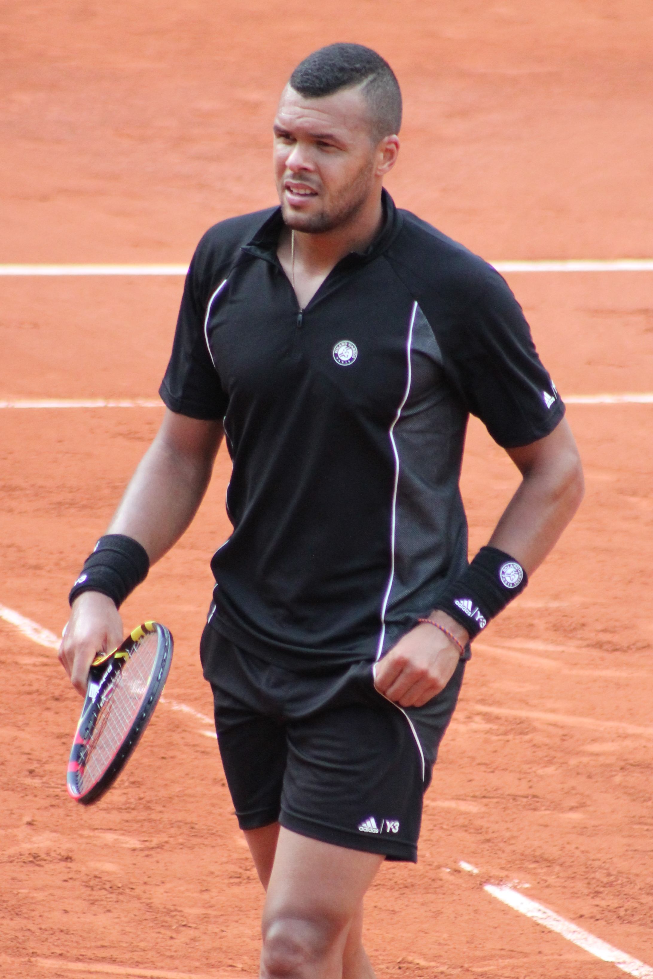 Tsonga RG15 (6)